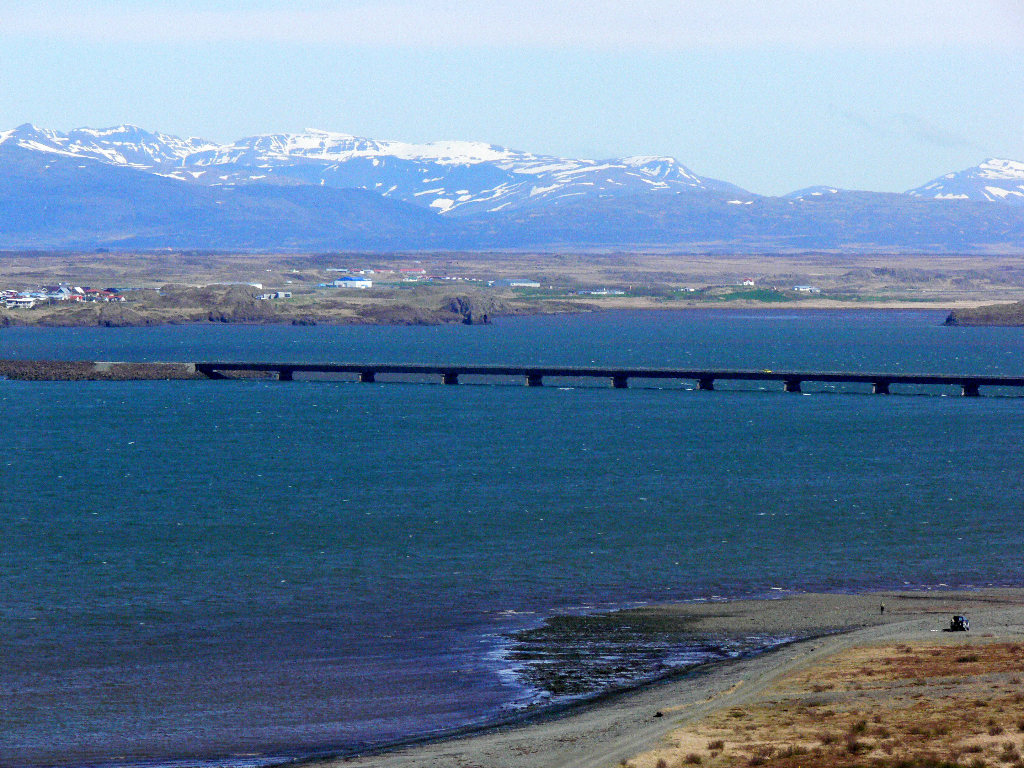 Brücke nach Borgarnes